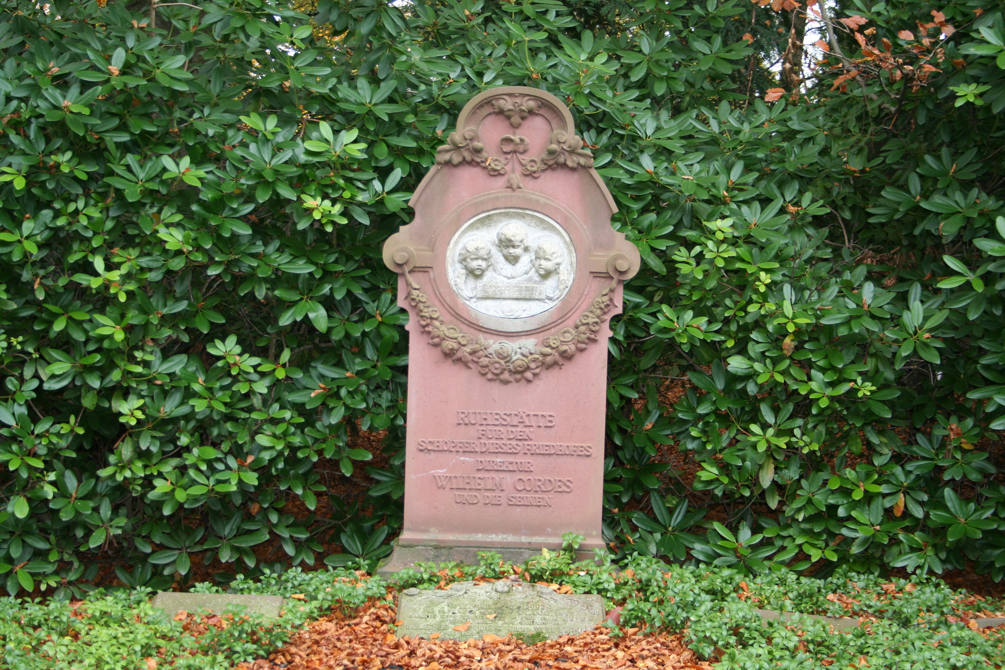 (Johann) Wilhelm Cordes (* 11. März 1840 in Wilhelmsburg; † 31. August 1917 in Hamburg) war ein deutscher Architekt, der sich besonders auf die Friedhofsarchitektur spezialisiert hatte. Der Ohlsdorfer Friedhof in Hamburg wurde zu seinem Lebenswerk.